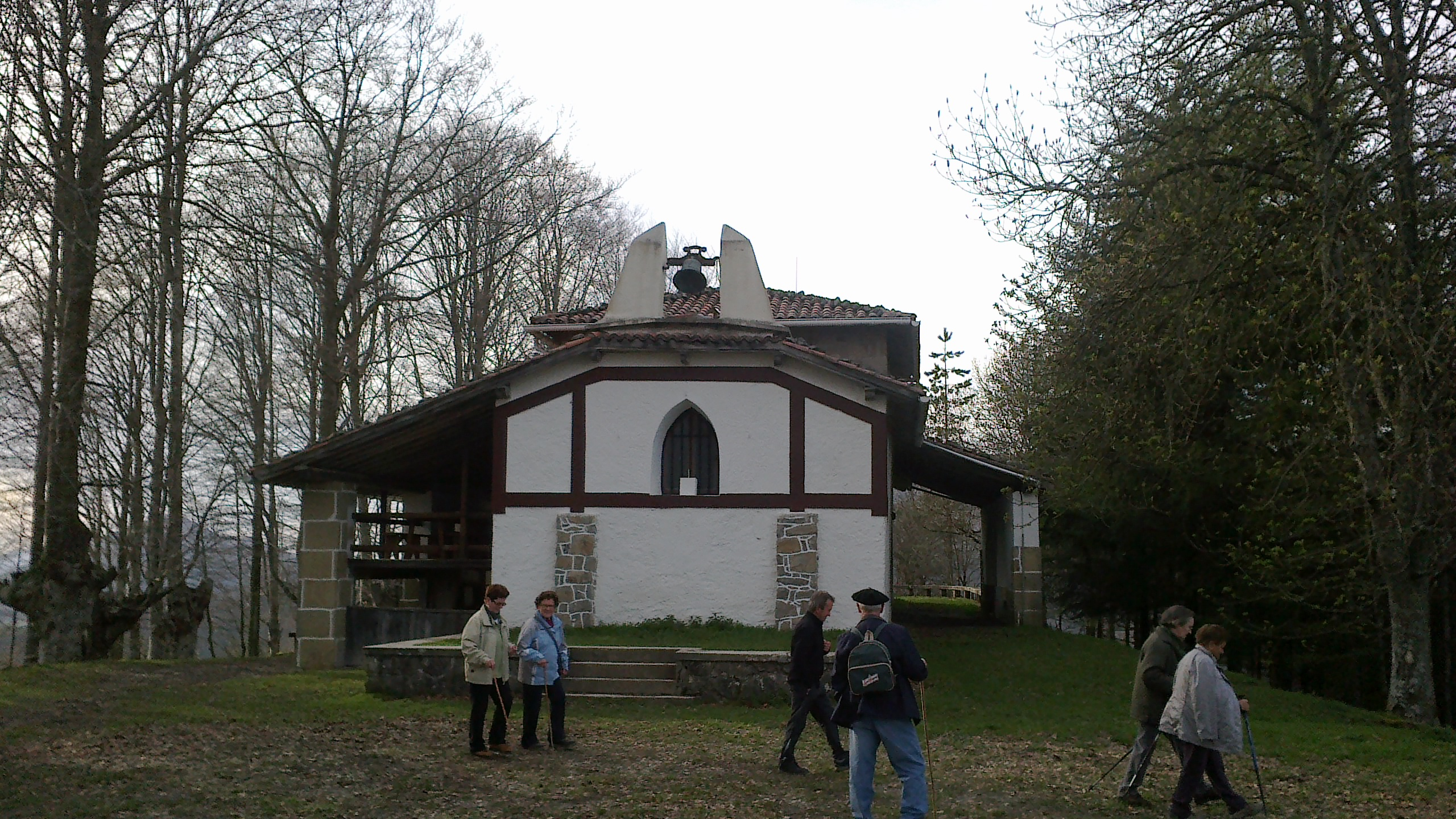 Kizkitzako baseliza (Ezkio-Itsaso, Gipuzkoa), hego-ekialdetik